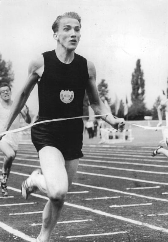 Zentralbild Erfurt-Wlocka Bey-Sch. 21.7.1956 VII. DDR-Leichtathletik-Meisterschaften in Erfurt. In der Zeit vom 20.7. bis zum 22.7.1956 finden in Erfurt die VII. Leichtathletik-Meisterschaften der DDR in den Staffel- und Einzelwettbewerben der Männer und Frauen statt. UBz: Vorlauf im 100-m-Lauf der Heren. Manfred Steinbach (Wissenschaft Halle) passiert als klarer Sieger das Ziel.